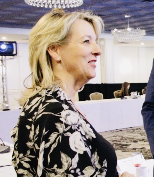 La semaine dernière, j’ai rencontré UMQ, notamment le président Cusson Alexandre, la mairesse Sylvie Parent de Longueuil et Maxime Pedneaud-Jobin, maire de Gatineau pour discuter des priorités et des défis des municipalités. I met with UMQ last week, including with President Cusson Alexandre, Mayor Sylvie Parent of Longueuil and Maxime Pedneaud-Jobin the Mayor of Gatineau, to discuss their priorities and challenges facing municipalities.